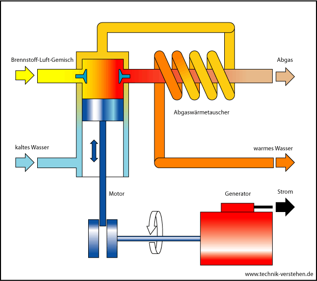 Prinzip einer BHKW-Anlage.